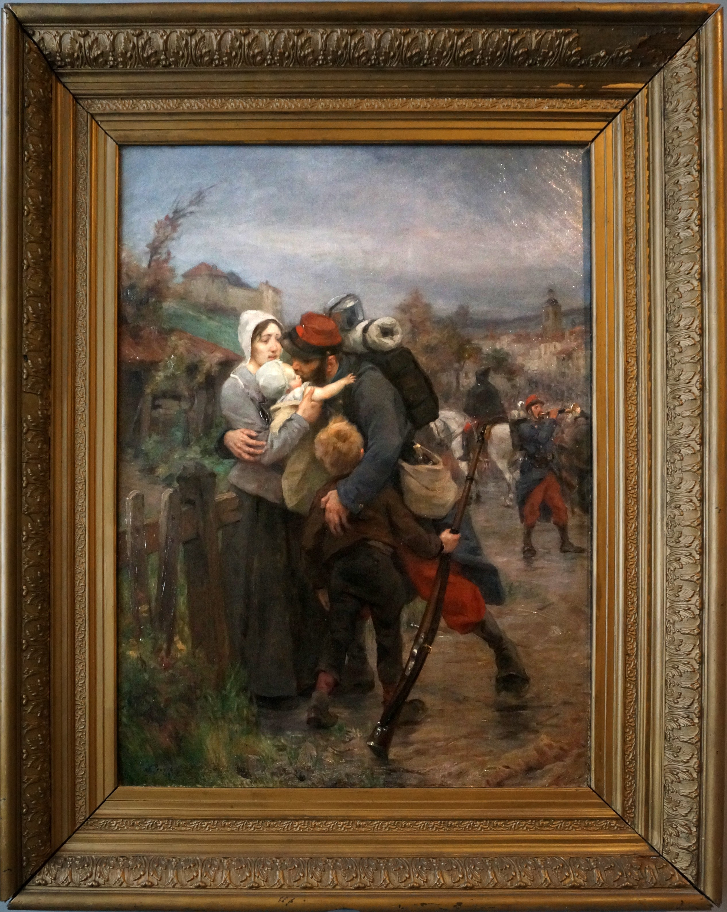 Lors de l'exposition temporaire été 1914 Nancy et la Lorraine dans la guerre au Musée Lorrain. Peinture de V.Prouvé, Les adieux d'un réserviste ou Pour la Patrie , 1887. Huile sur toile. Dépot du musée de l'infanterie de Montpellier. 26e RI.